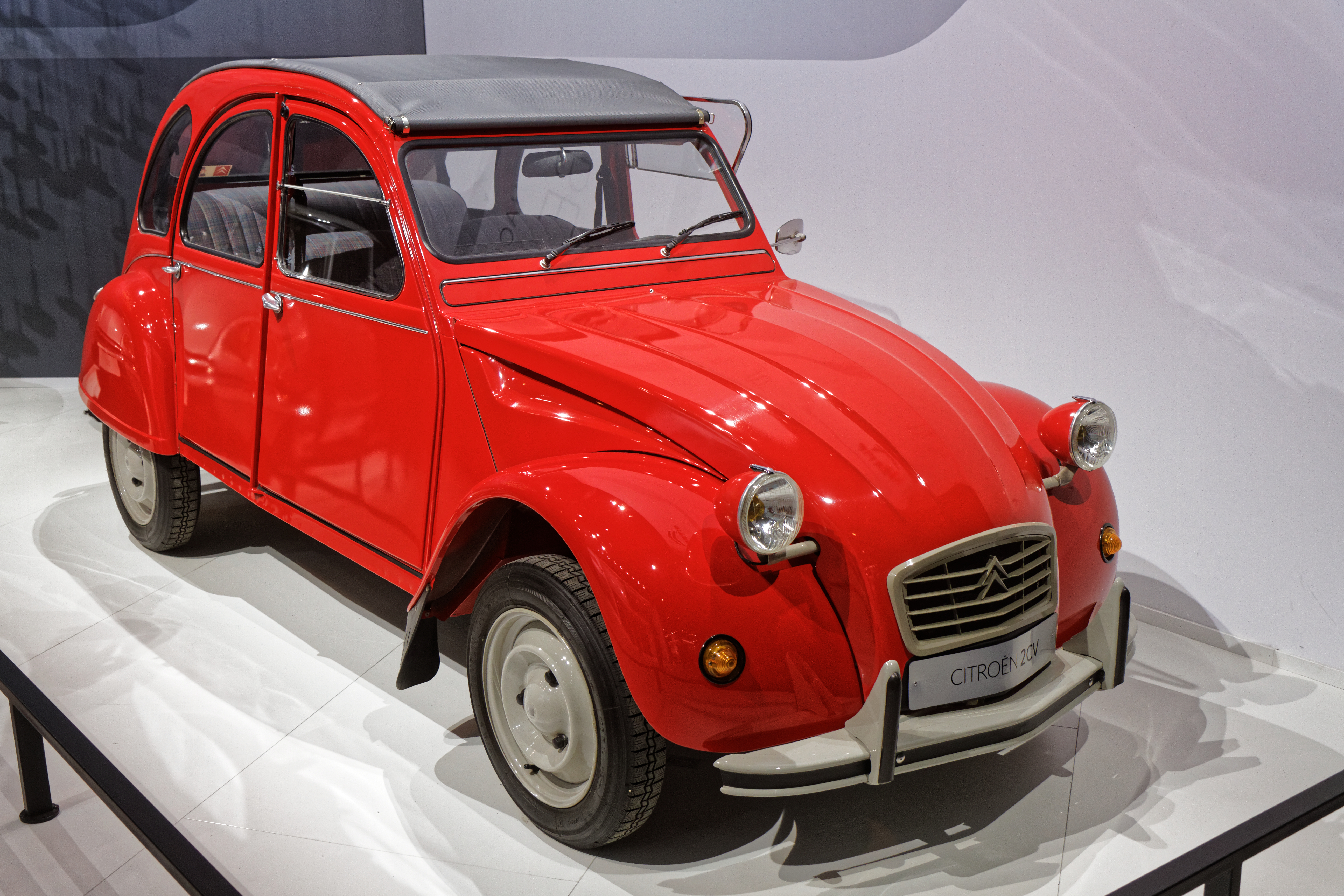 Une Citroën 2CV présentée lors du mondial de l'automobile de Paris 2014.